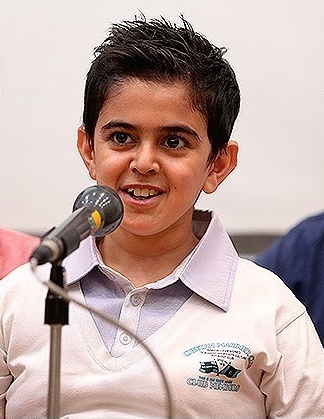 امیر محمد متقیان در نشست خبری گروه کودک و خردسال شبکه دو سیما با حضور عوامل برنامه عمو پورنگ